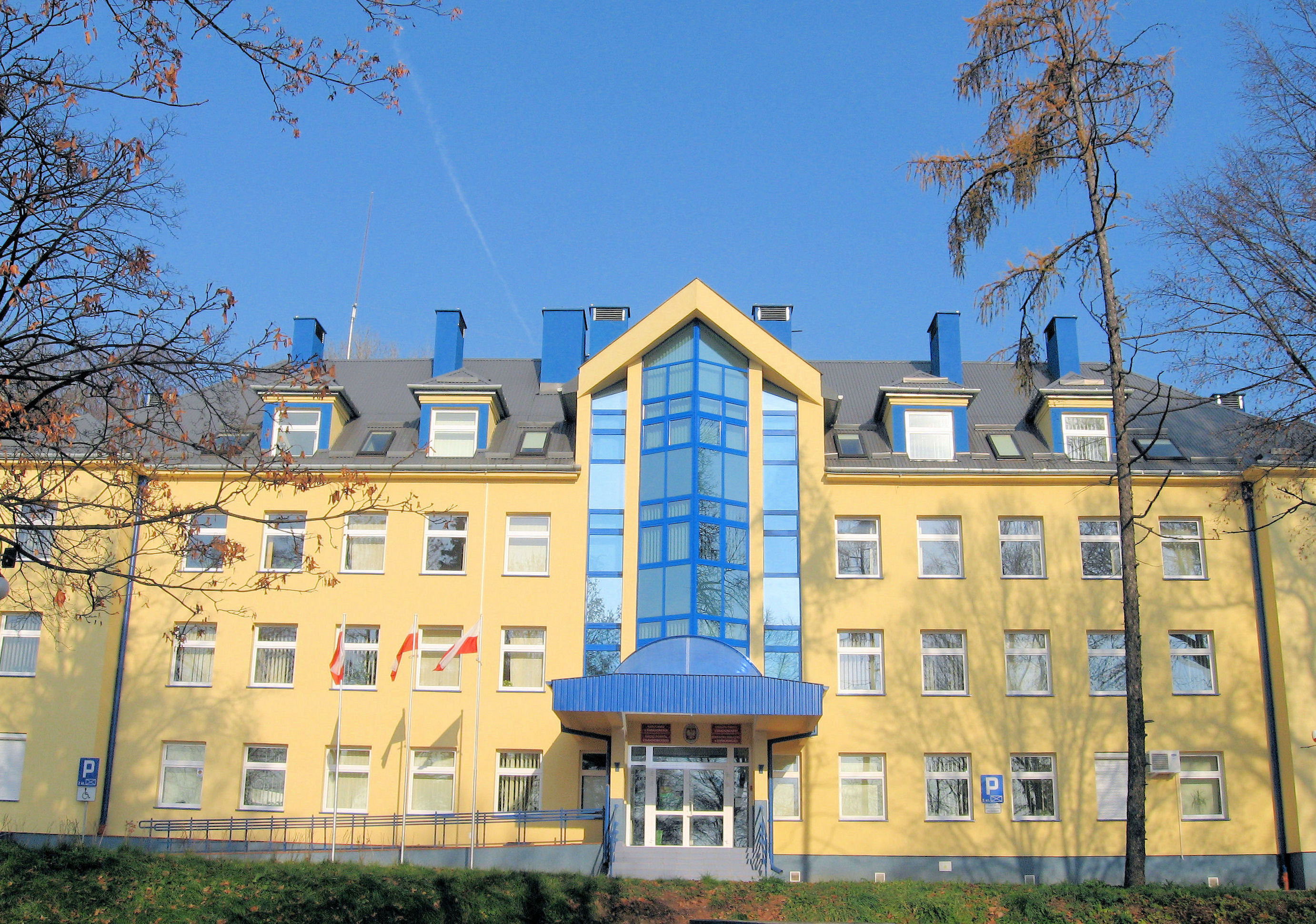 Budynek Starostwa Powiatowego w Starachowicach (front)